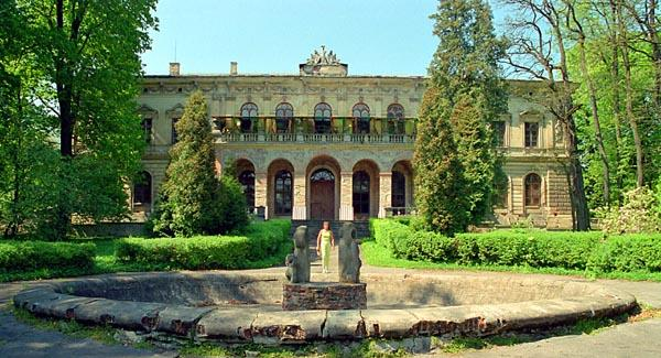 Pilica Palace in Poland